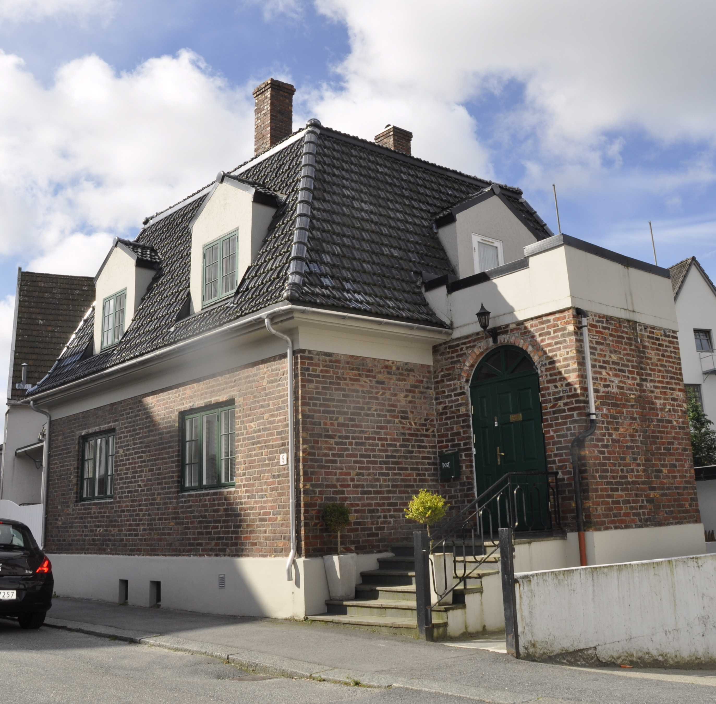 Cort Adelers gt 5, Michael Slettebø